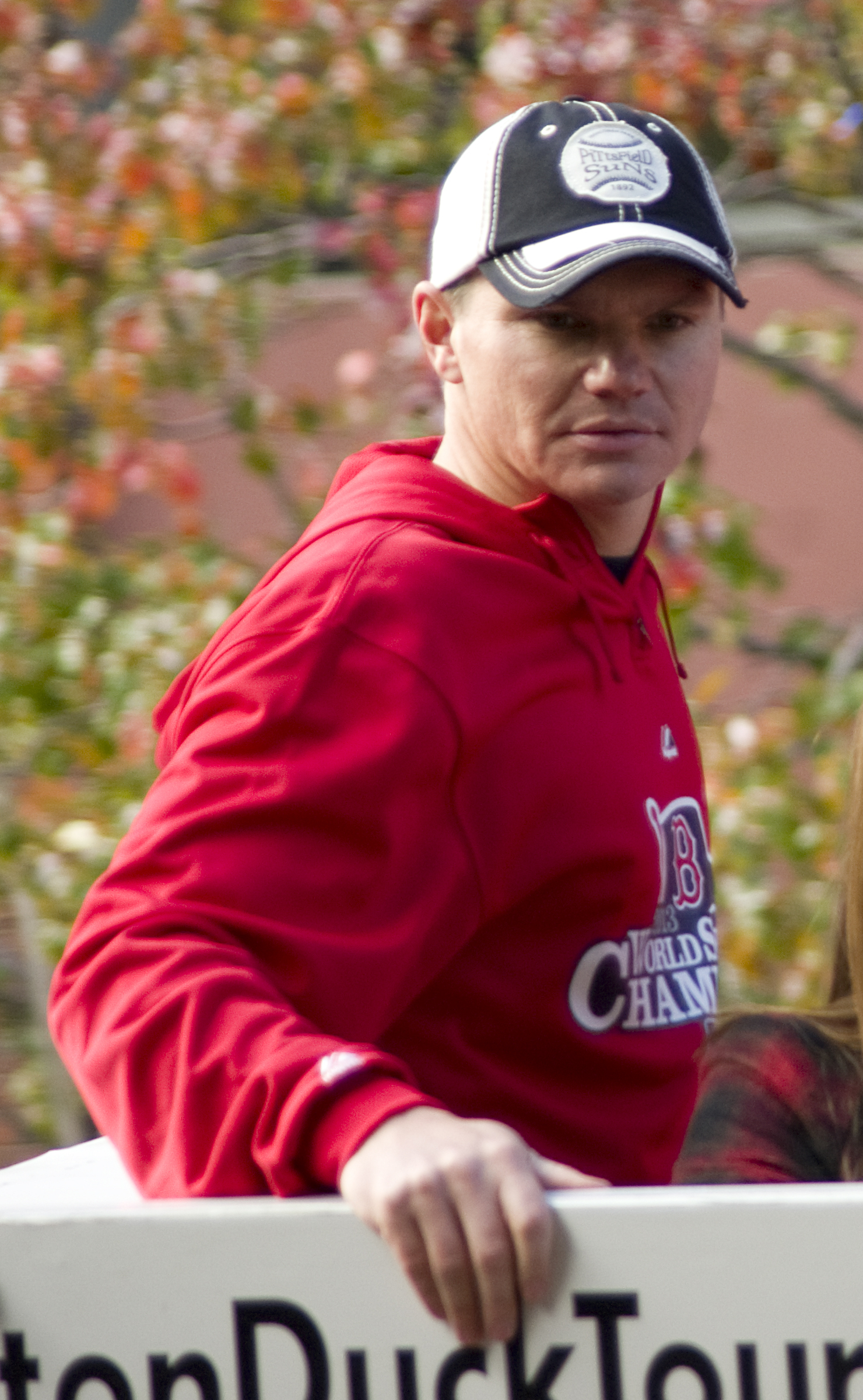 Ben Cherington